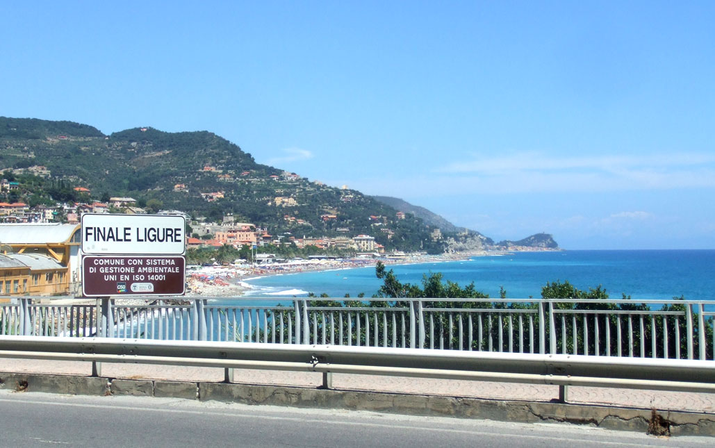 Panneau d'entrée dans Finale Ligure relatant l'engagement environnemental (depuis Calice Ligure)